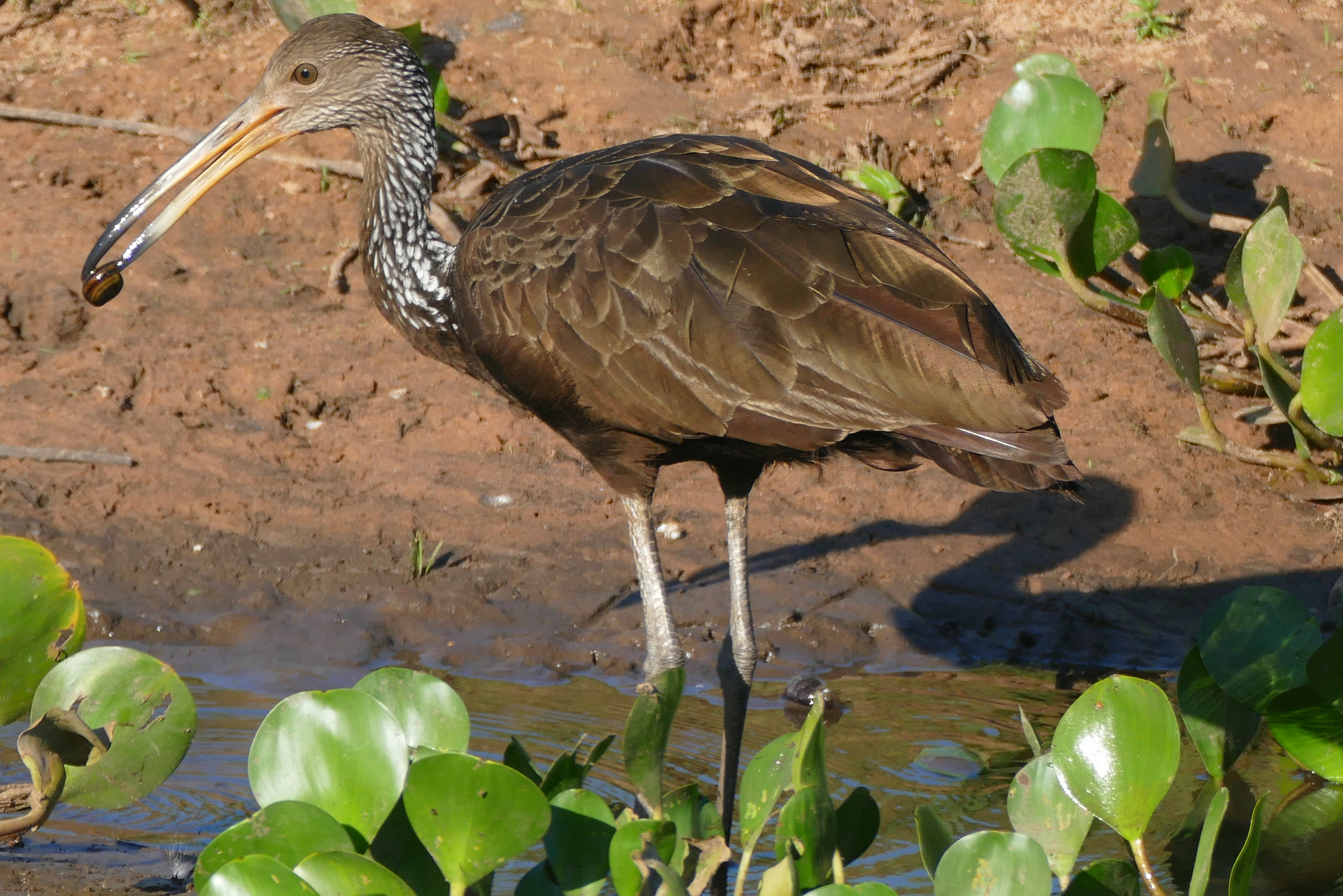 Transpantaneira, Poconé, Mato Grosso, BRAZIL